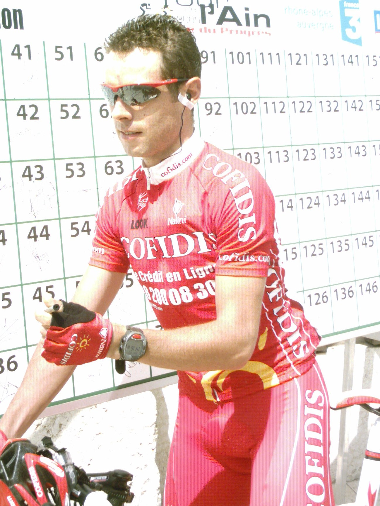 Mickaël Buffaz lors de la signature préalable au départ de la première étape du Tour de l'Ain 2009